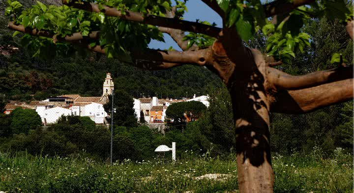 Una vista del poble de Benigembla des de el Càmping de la Vall de Pop d´aquesta població.